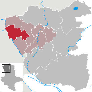 (Original text: Flecken Diesdorf im Landkreis Salzwedel)